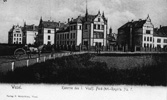 Die Weseler Reitzensteinkaserne auf einer Postkarte, vor 1914; Quelle der Datumsangabe